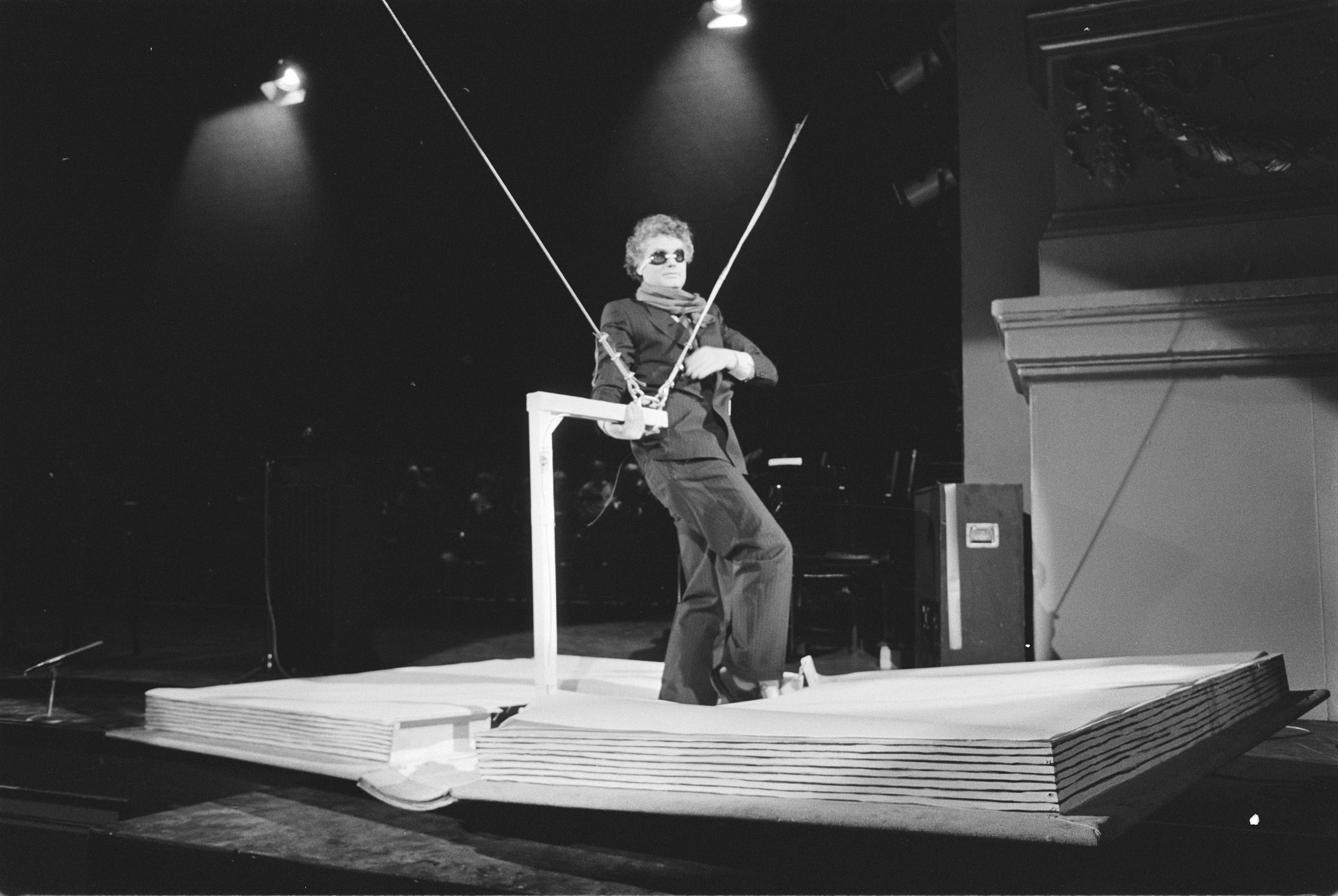 Boekenbal in Carré; Adriaan van Dis 'landt' met een boek, 20 maart 1984